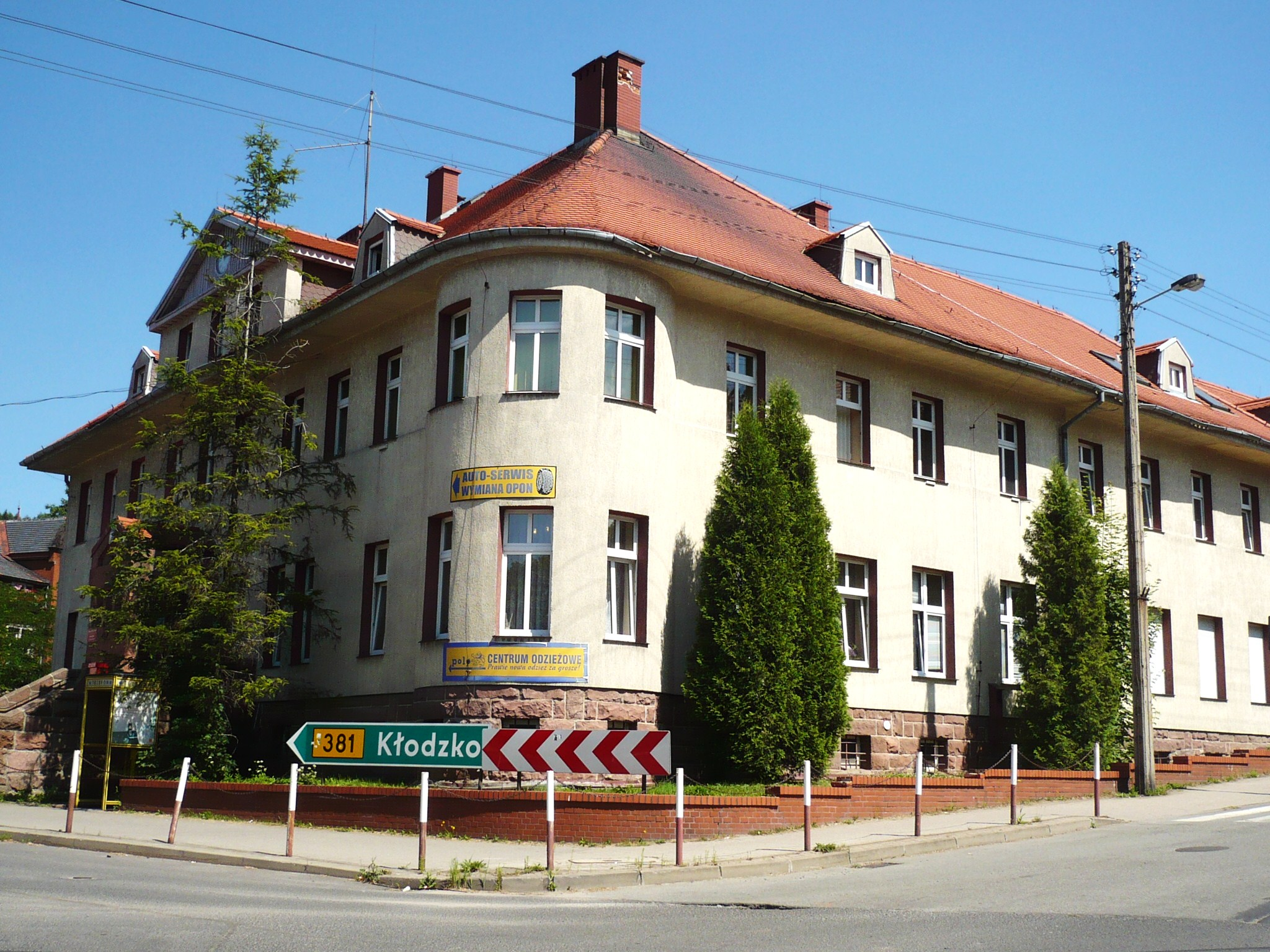 Nowa Ruda, ul. Niepodległości 1 - poczta, 1910